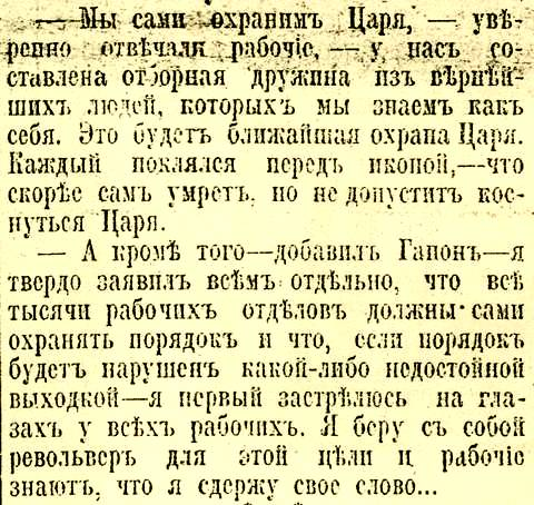 Фрагмент статьи Н. В. Насакина-Симбирского "Памяти 9-го января 1905 г." в газете "Слово"